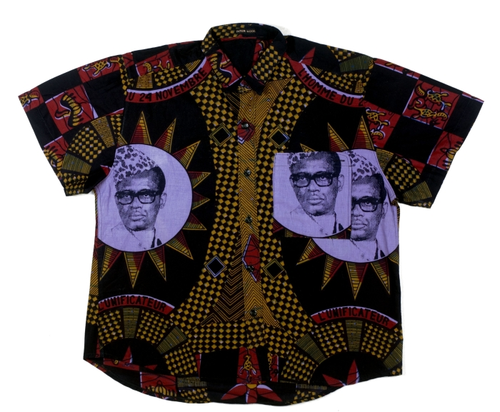 Op het hemd staat op de voor- en achterzijde het portret van Mobutu Sese Seko. De datum 24 november staat vermeld.